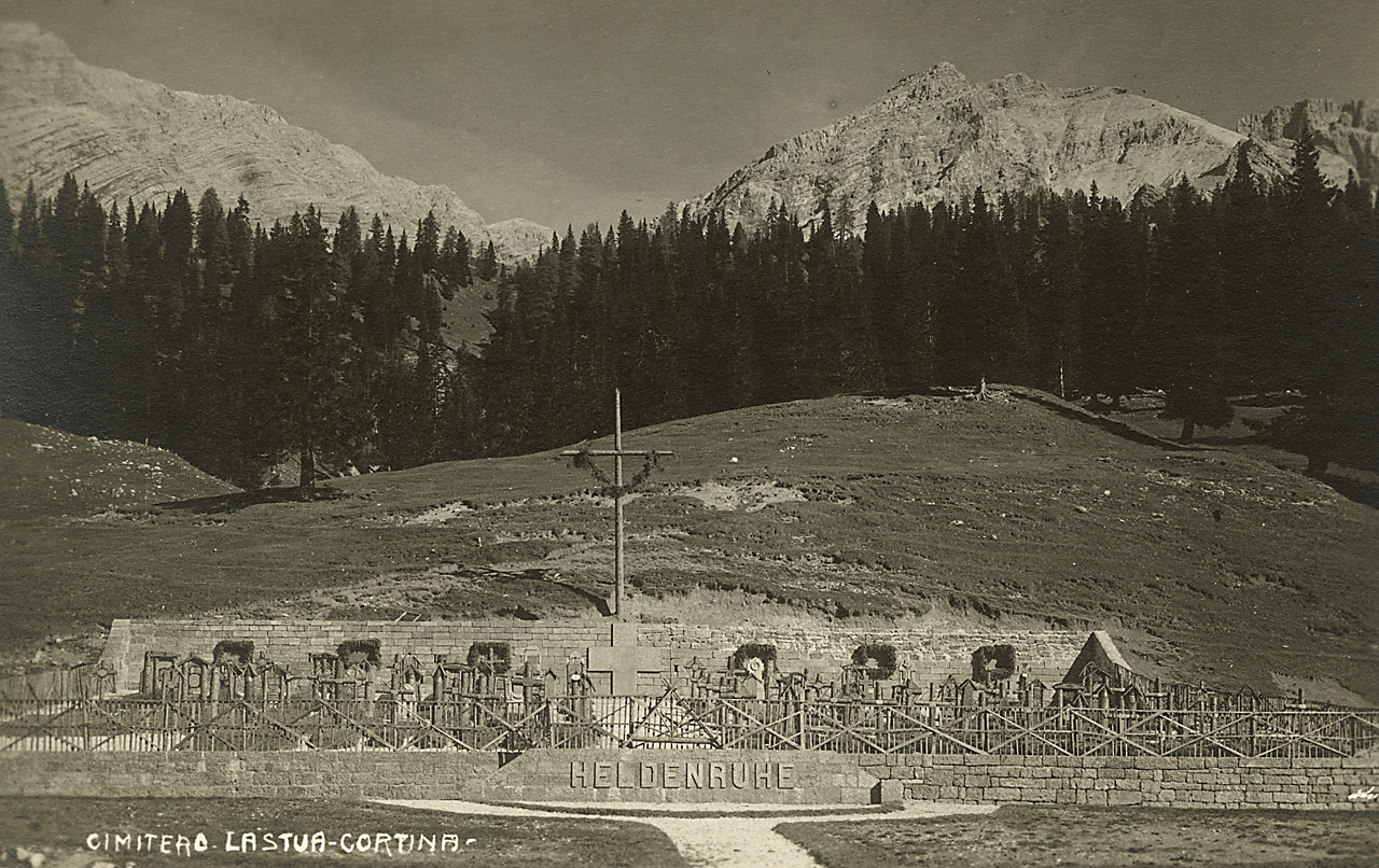 Cimetière militaire de Pocol, à Cortina d'Ampezzo en Italie, après la Première Guerre mondiale. Section réservée aux soldats allemands (Helden Ruhe : « Repos des héros » en allemand).